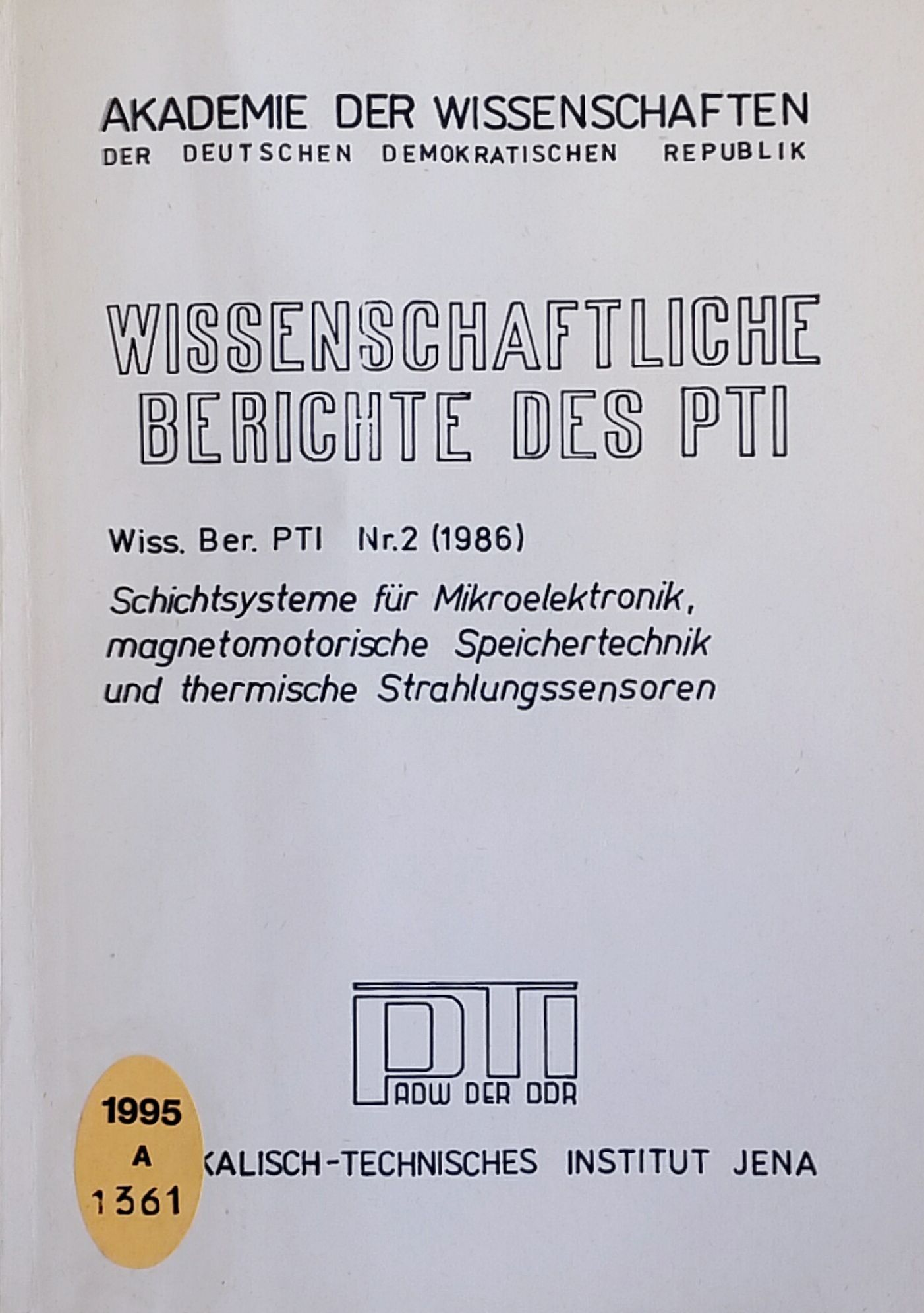 Jährliche Forschungsberichte des PTI. Auftragsforschung für Industriepartner ist hier nicht enthalten.